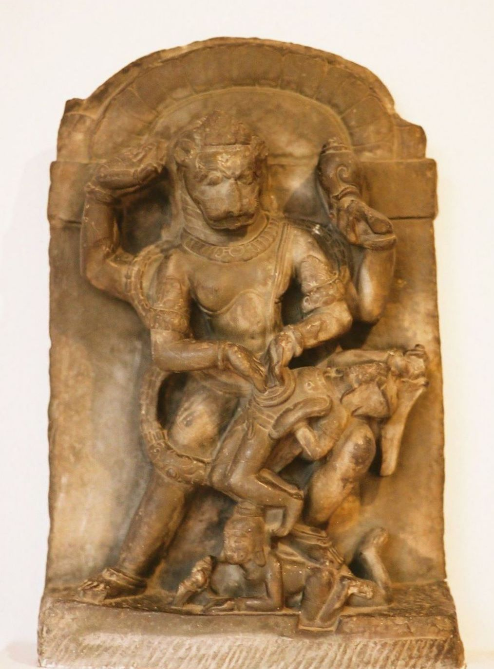 ヴィシュヌ神の化身、ナラシンハ (2005/01/22 National Museum, Delhi, INDIA)